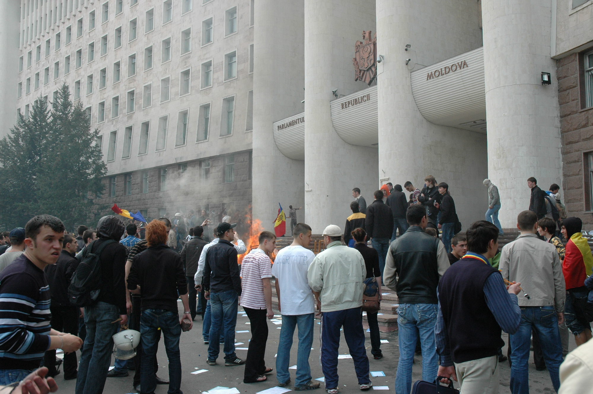 Protest riot in Chisinau after the 2009 Parliamentary Elections